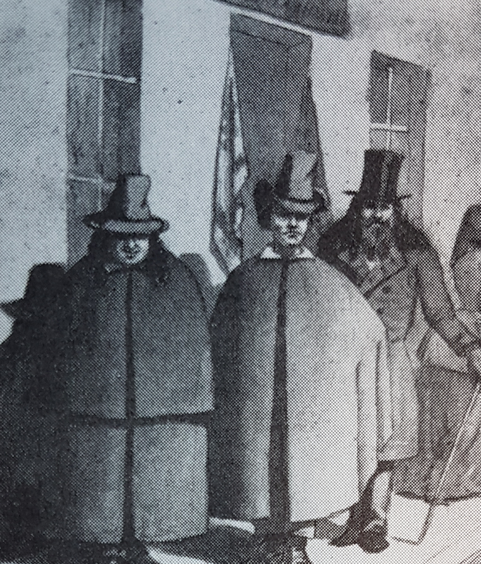 Carl Johan Sjöstrand i mitten omgiven till vänster av Kunze målare och Andreas Fornander bildhuggare, akvarell av Carl Johan Alfred Skogman , avfotograferad bild från Allhems Svenskt konstnärslexikon.